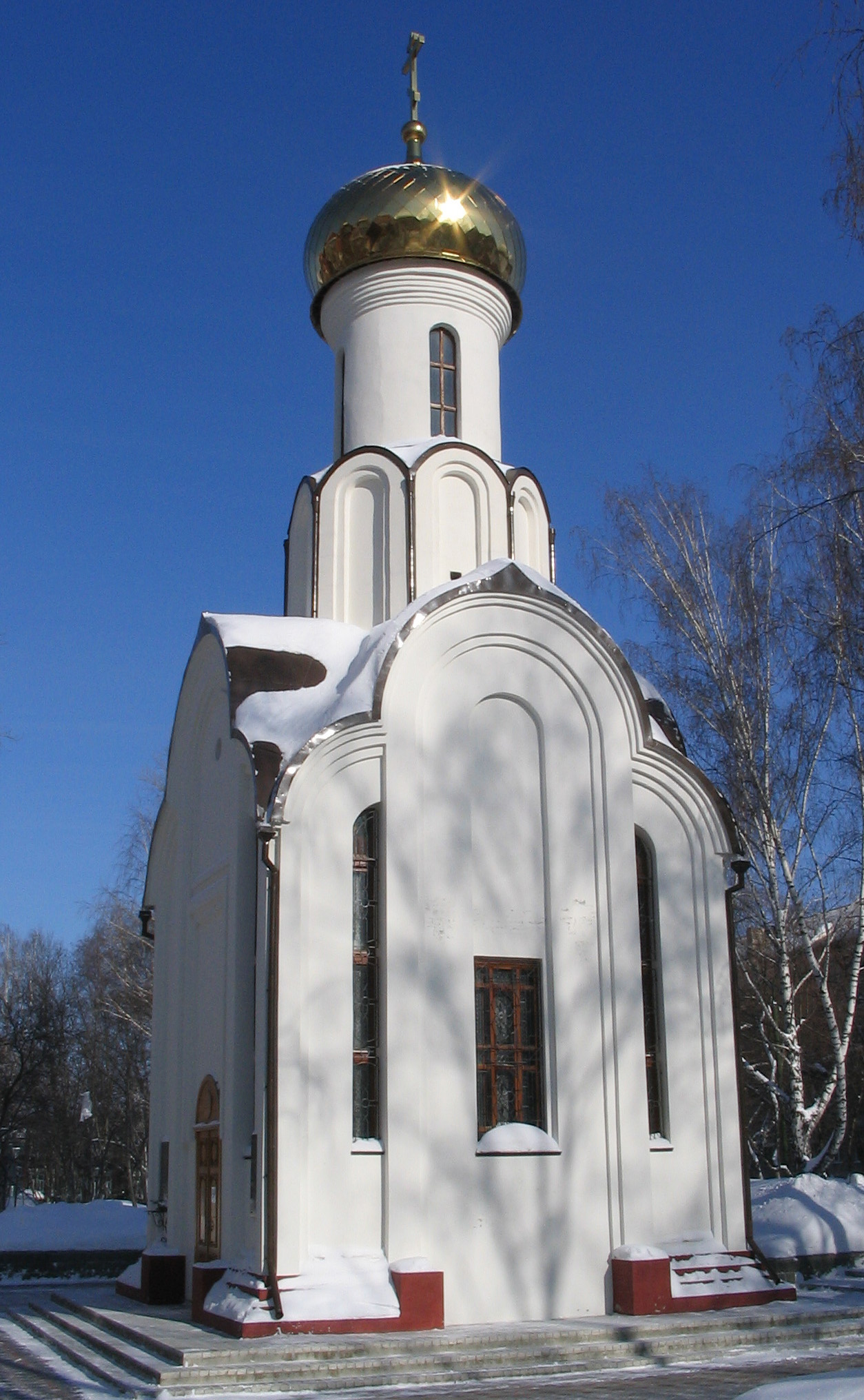 Часовня Преображения Господня